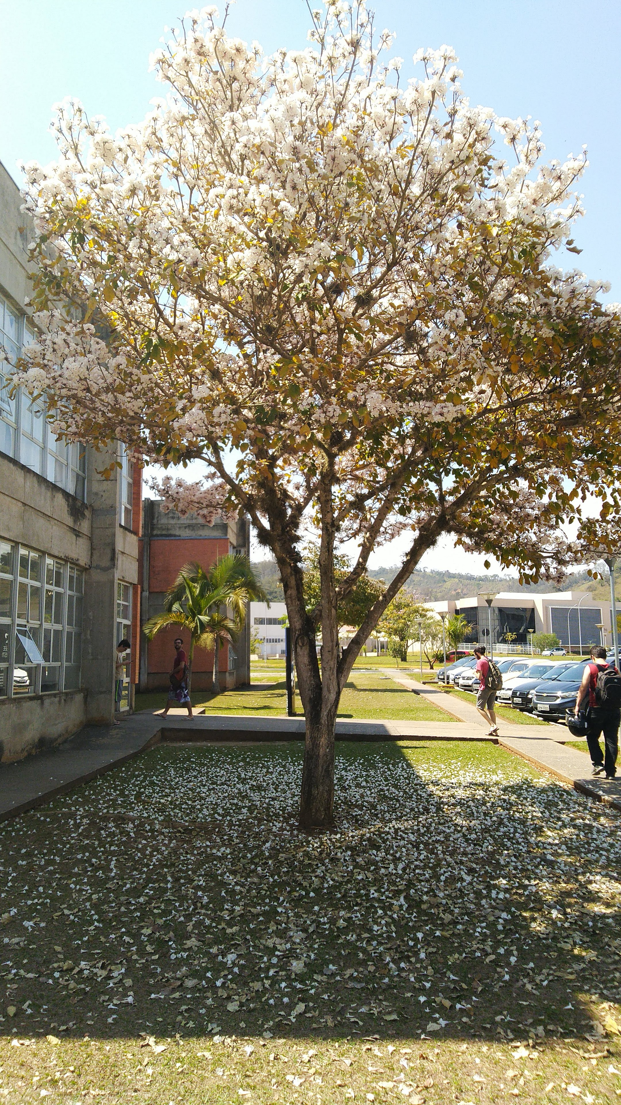 Fachada do prédio do IESTI da Universidade Federal de Itajubá, do blocos I2 com vista do Ipê Branco em Florada